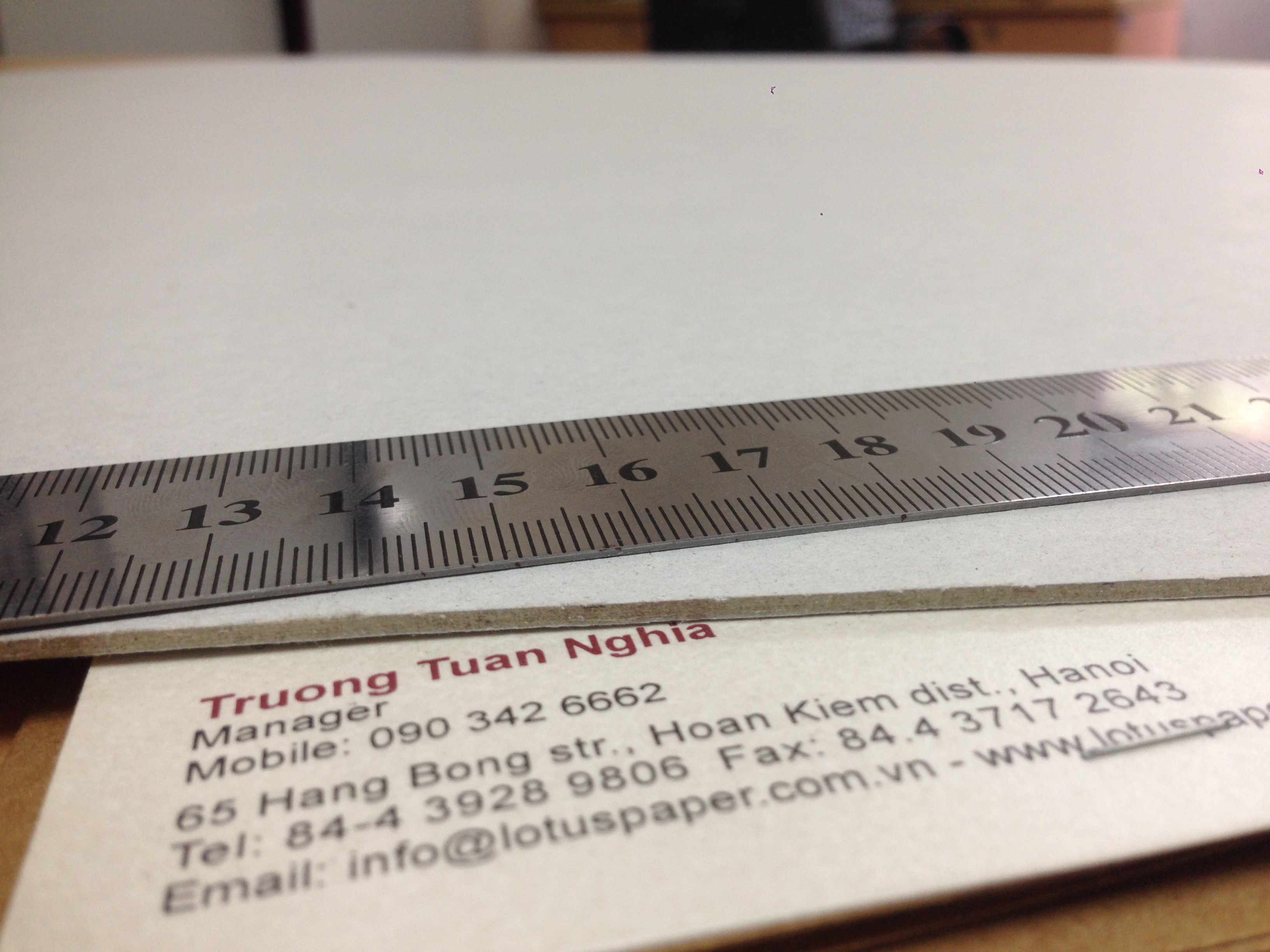 Bìa carton màu ghi nhạt, dày 1,55mm, rộng 785mm, dài 1085mm